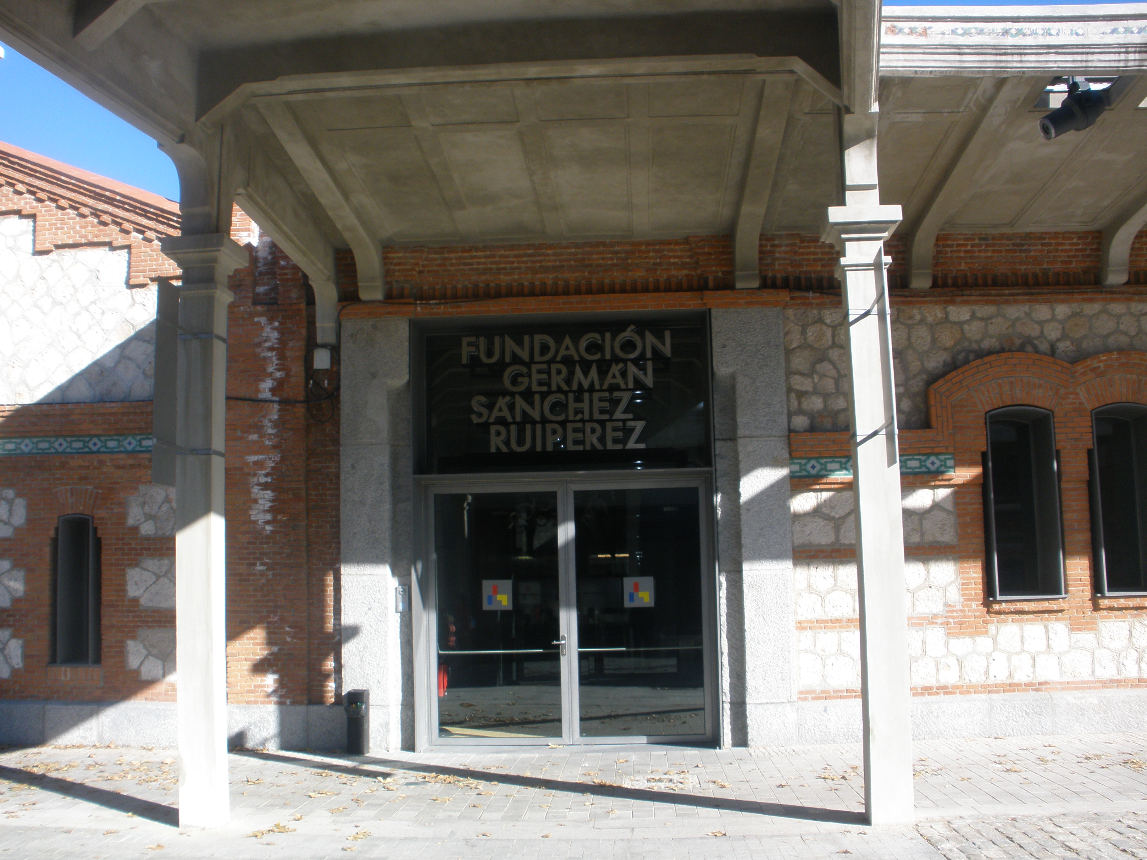 Acceso de la Fundación Germán Sánchez Ruipérez (Matadero Madrid) en diciembre 2012